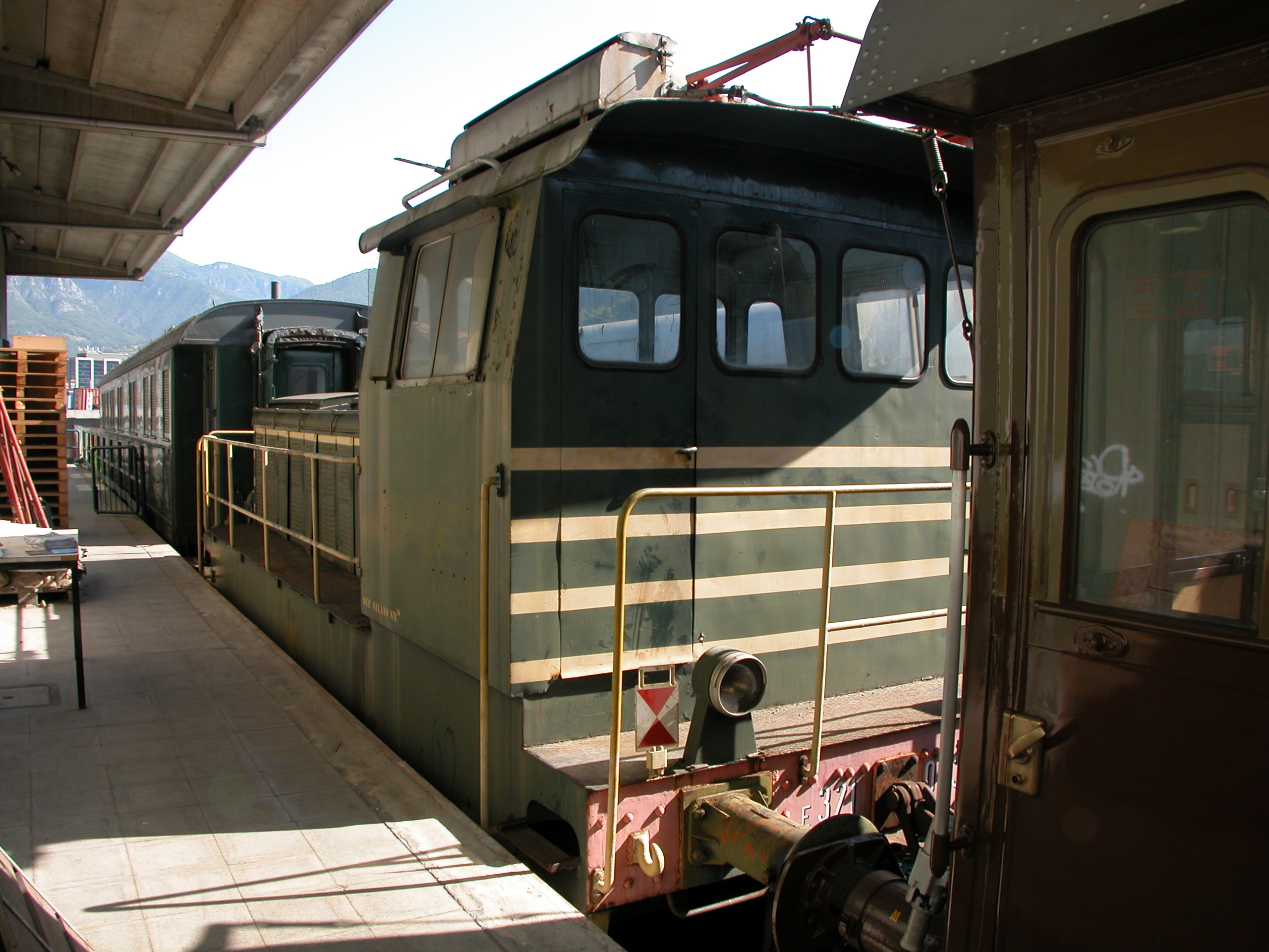 Locomotiva elettrica da manovra FS E.321.003 – Vista dal lato posteriore sinistro.